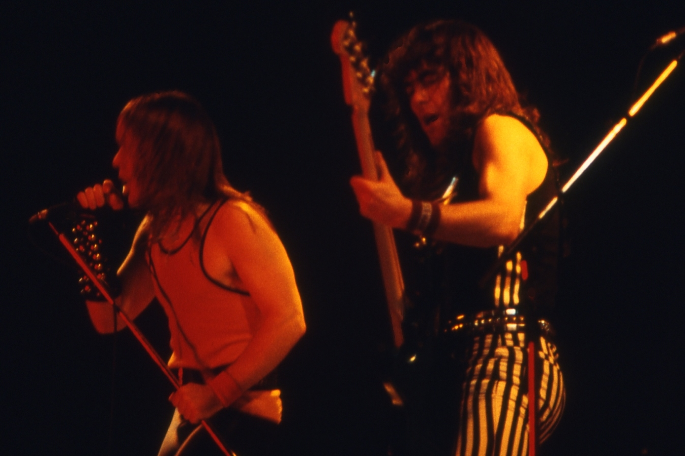 Iron Maiden Concierto celebrado el 4 de abril de 1982 en el Velódromo de Anoeta en San Sebastian